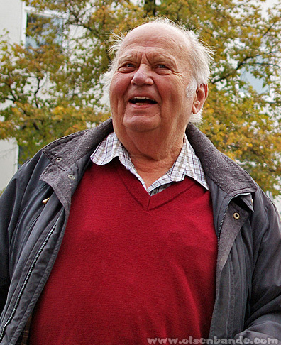 Ove Verner Hansen bekannt als "das Dumme Schwein" aus den Olsenbandenfilmen am 5. Oktober 2013 zur Olsenbanden-Jubiläumsveranstaltung im Kino Palads in Kopenhagen.